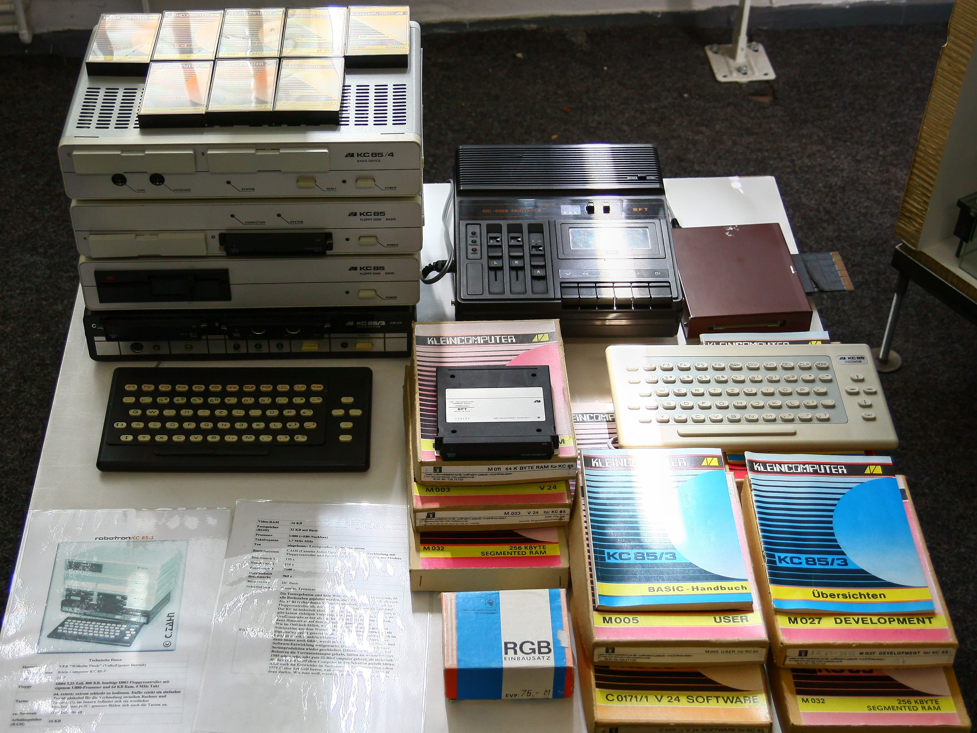 DDR-Museum Zeitreise in Radebeul 2012 - Kleincomputer KC85/3 vom VEB Mikroelektronik „Wilhelm Pieck“ Mühlhausen von 1986/1987 mit Peripherie-Geräten, Dokumentationen und Software-Cassetten - einige technische Daten KC85/3: 8-Bit-Mikroprozessors U880 (Nachbau Zilog Z80), 1,7 MHz Taktfrequenz, 16 kB RAM, 32 kB ROM mit integriertem Basic-Interpreter, 5 1/4 Zoll Floppy-Disk (800 kB) - als Software-Cassetten sind u.a. eine Textverarbeitung und KC Pascal abgebildet